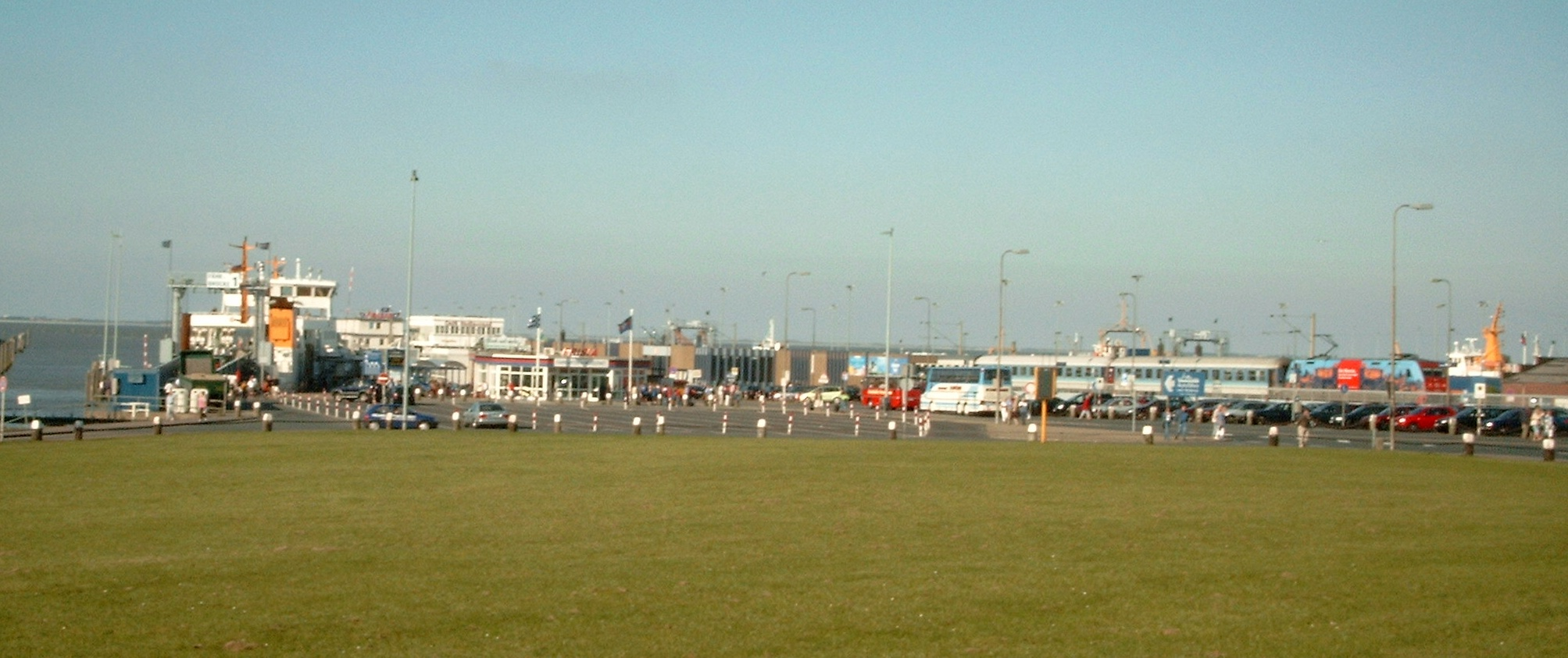 Bahnhof Norddeich Mole mit Fährschiff nach Norderney links im Bild